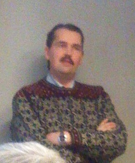 Ago Pajur oma koostatud raamatu "Eesti riikluse alusdokumendid 1917-1920" esitlusel Eesti Ajalooarhiivis.